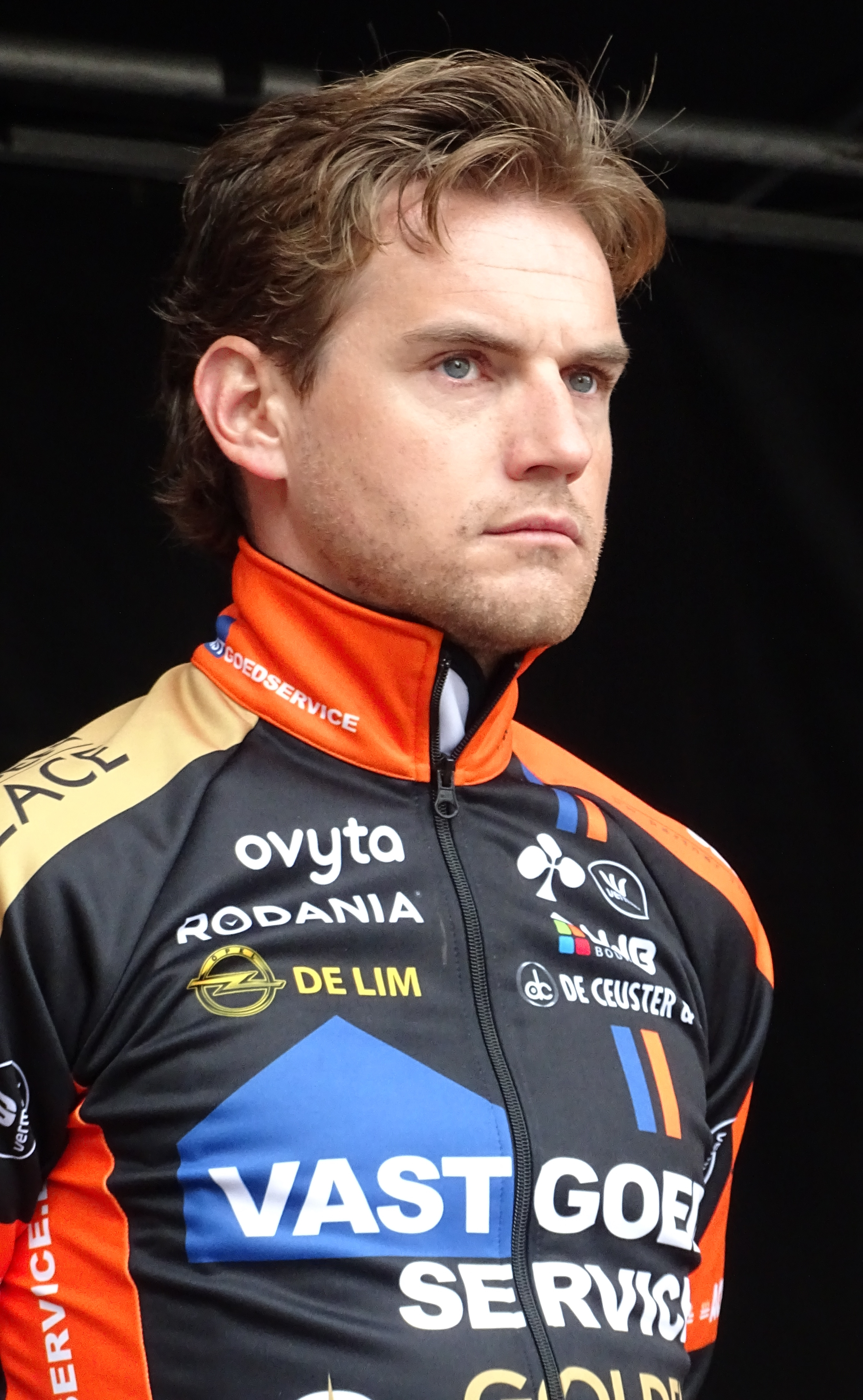 Reportage réalisé le dimanche 15 mars à l'occasion du départ et de l'arrivée de la Course des chats 2015 à Ypres, Belgique.